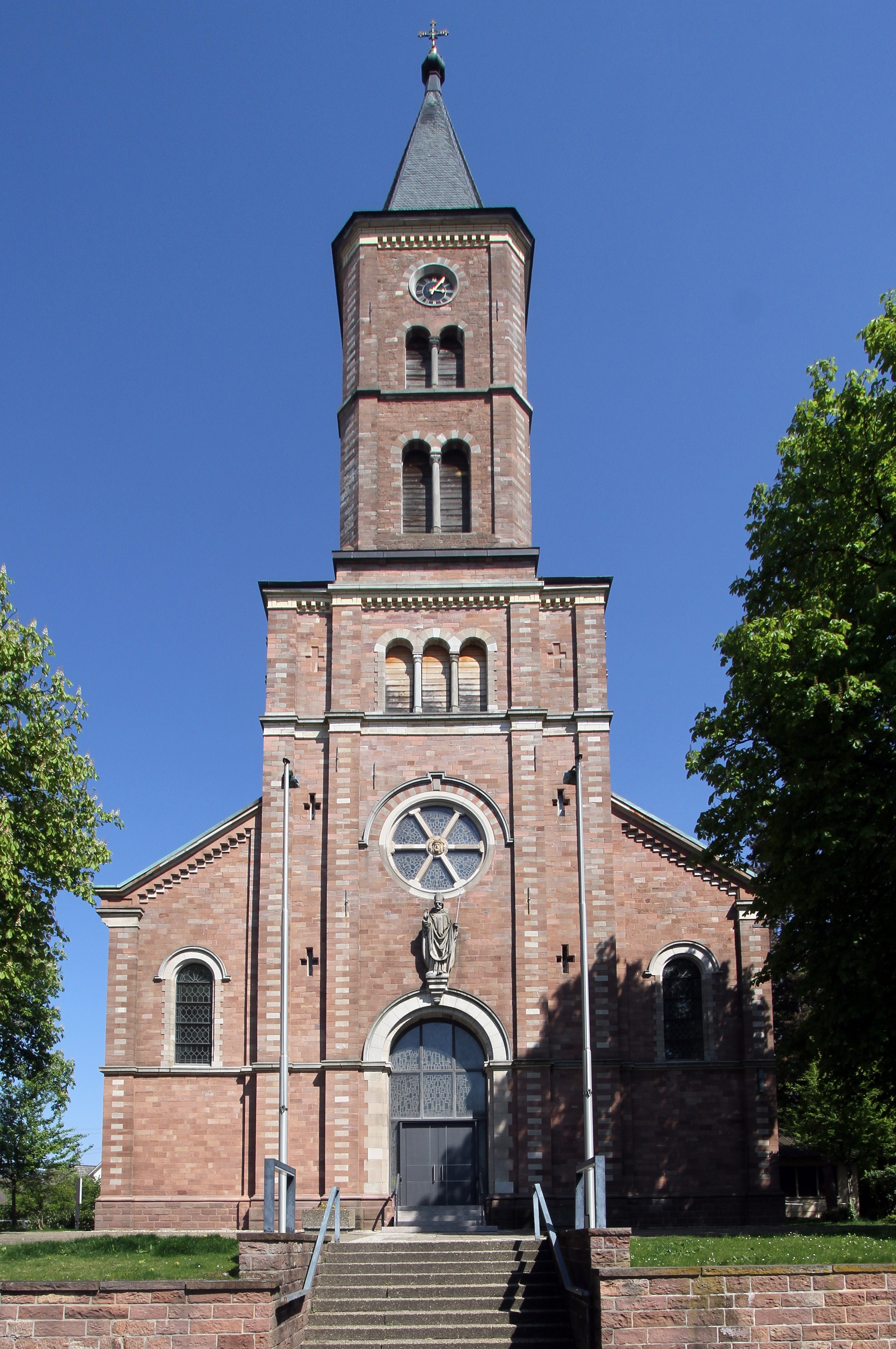 Kath. Kirche St. Dionysius in Baden-Baden-Oos